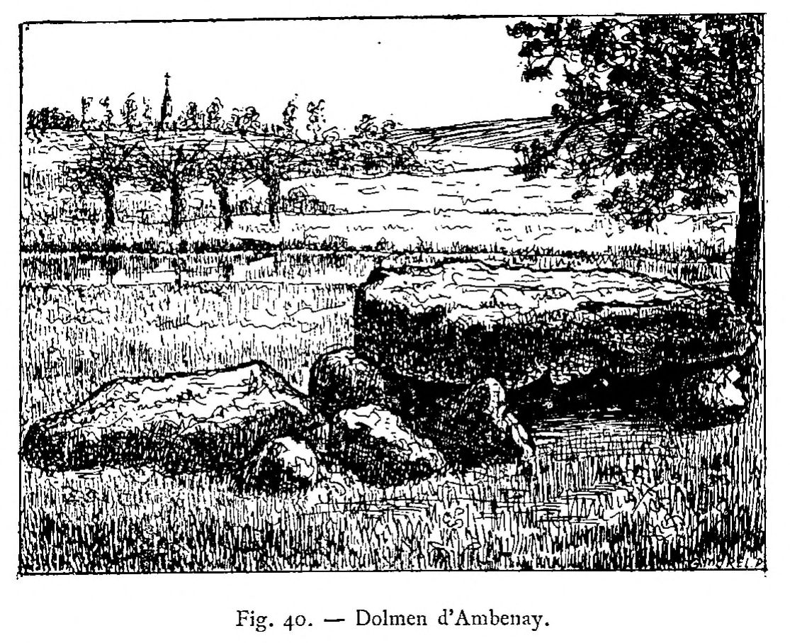 Dolmen de Rugles à Ambenay dessiné par Amand Desloges en 1893 et publié dans le Bulletin de la Société normande d’Études préhistoriques en 1902